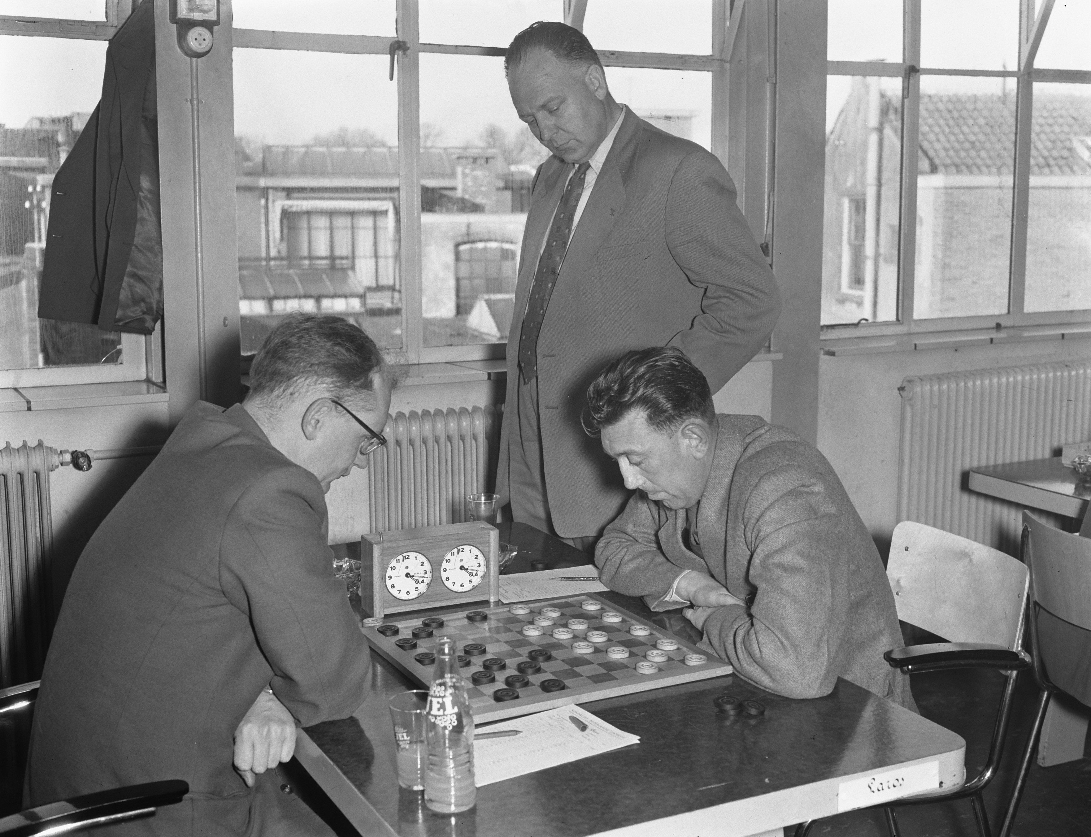 Collectie / Archief : Fotocollectie Anefo Reportage / Serie : [ onbekend ] Beschrijving : Kampioenschappen dammen Bergsma, Keller (staand), Laros Annotatie : Locatie: Drukkerij Van Broekhoven Datum : 12 maart 1955 Locatie : Utrecht (stad) Trefwoorden : dammen Persoonsnaam : Bergsma, P, Keller, R.C., Laros, J.H. Fotograaf : Pot, Harry / Anefo Auteursrechthebbende : Nationaal Archief Materiaalsoort : Negatief (zwart/wit) Nummer archiefinventaris : bekijk toegang 2.24.01.04 Bestanddeelnummer : 907-0097